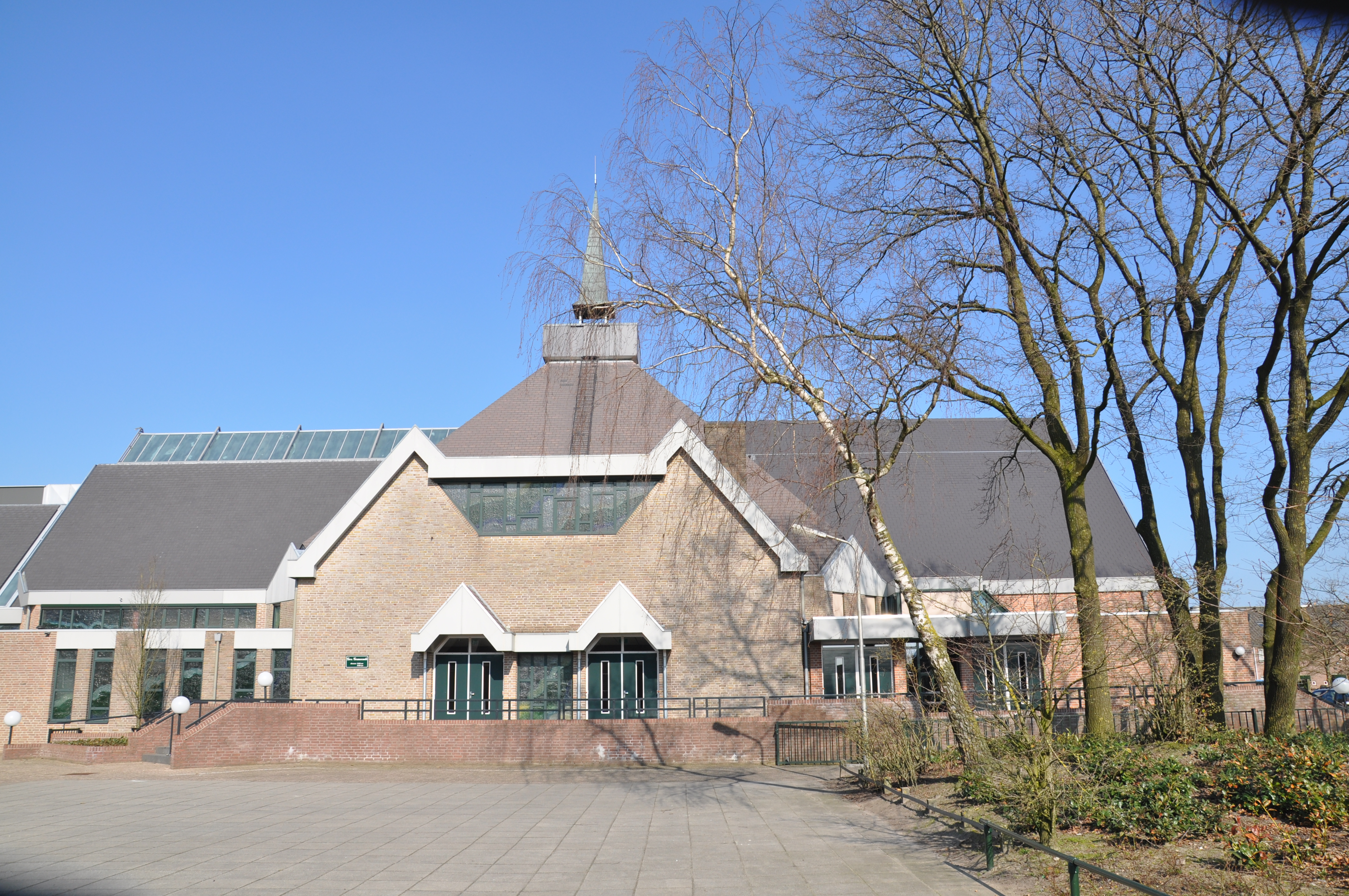 Achterzijde van het gebouw van de Gereformeerde Gemeente te Kootwijkerbroek, Veluwe. Gebouw heeft 1.780 zitplaatsen.